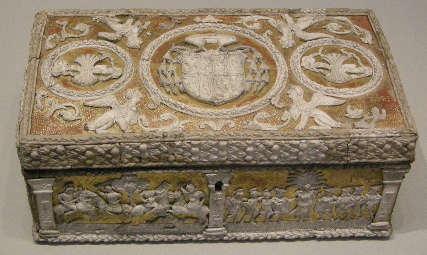 Ferrara, cofanetto con stemma cardinale bernardo cles, 1530-38